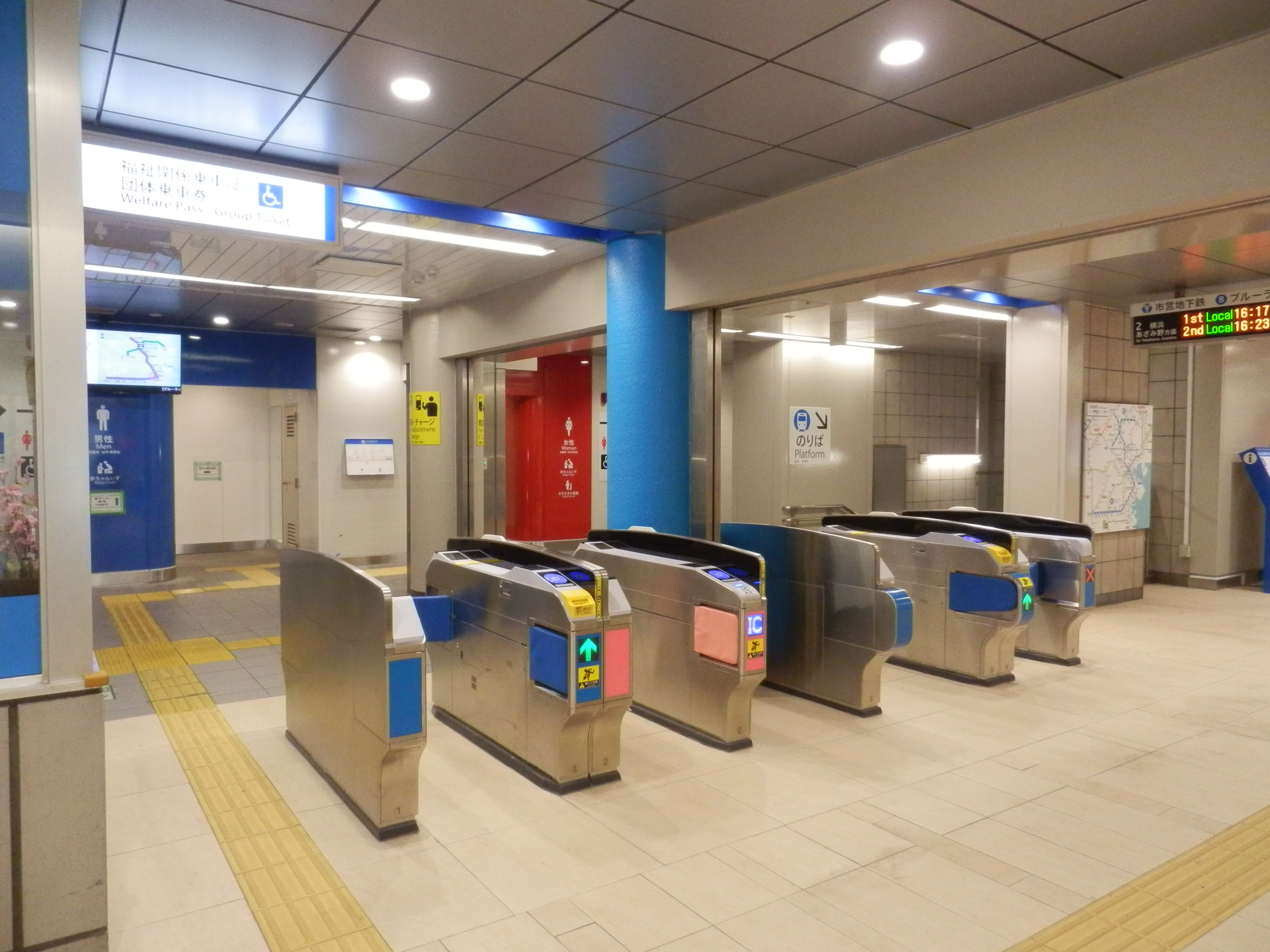 阪東橋駅改札口